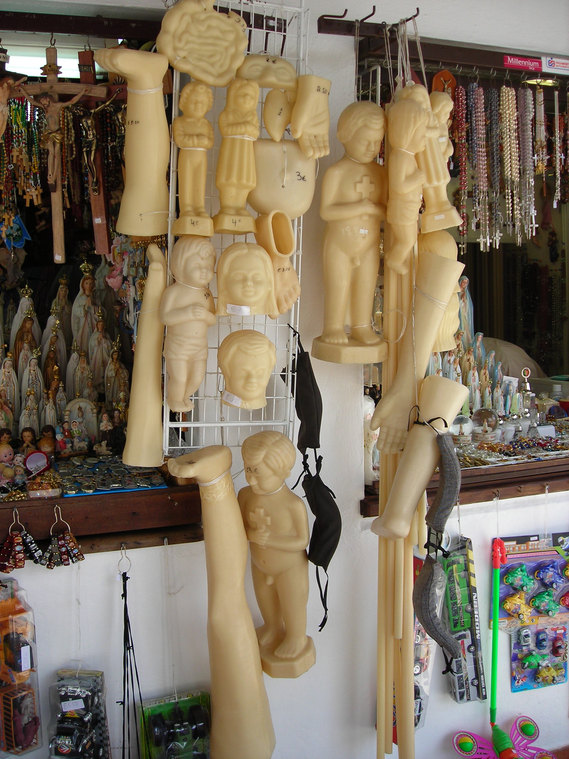 Ex-votos in Fátima